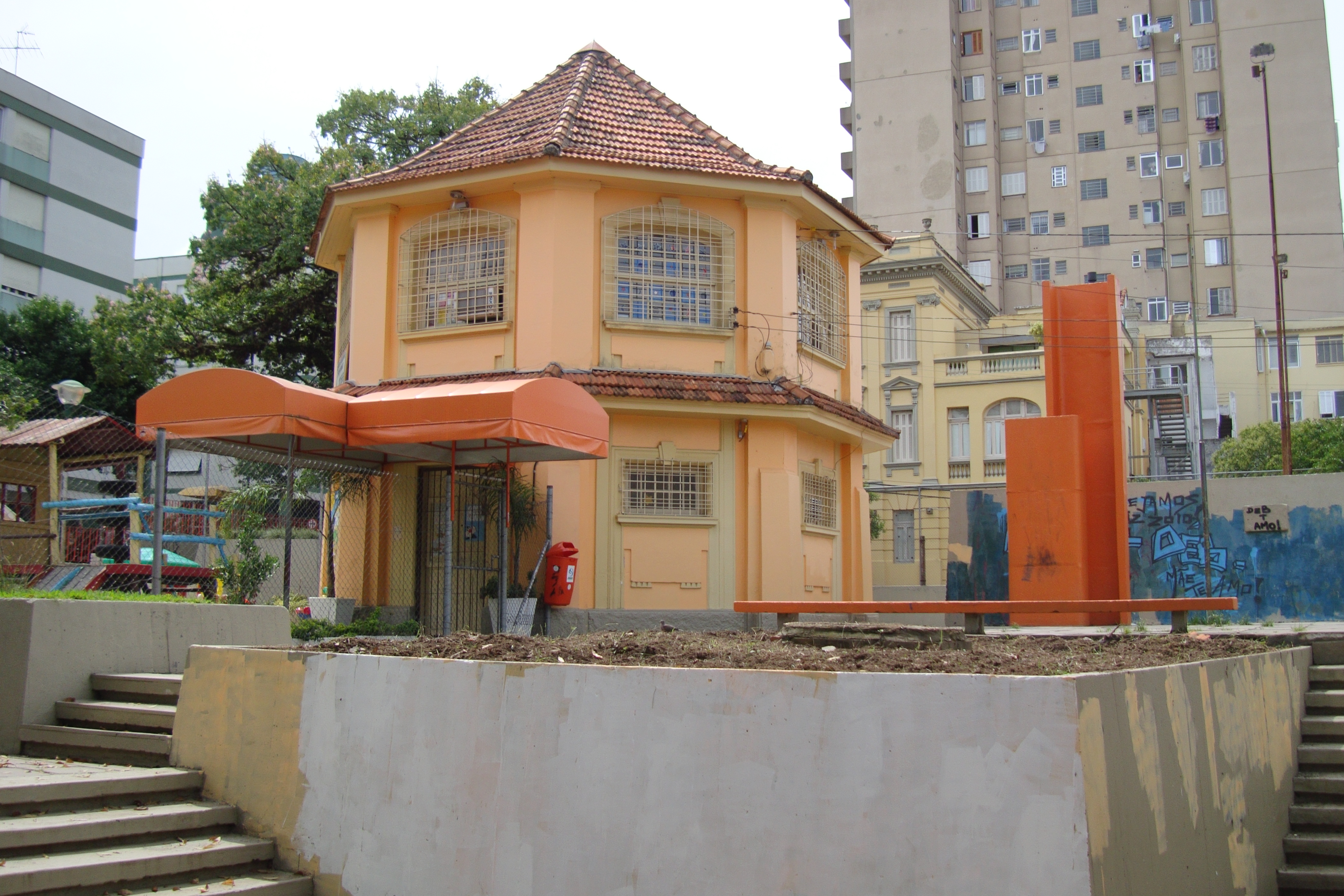 Praça Genaral Osório, mais conhecida como do Alta da Bronze, em Porto Alegre